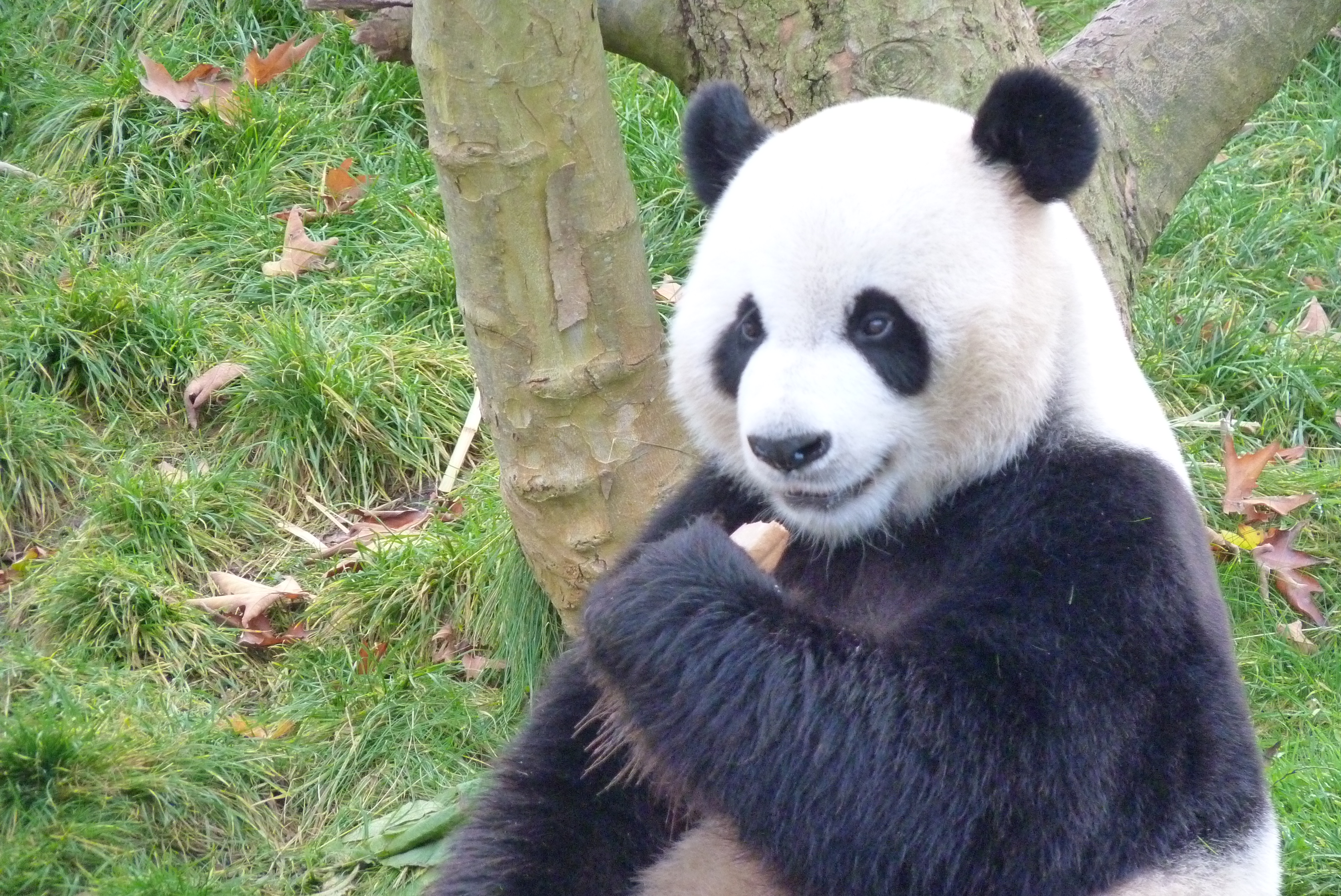 Пайри Дайза, панда